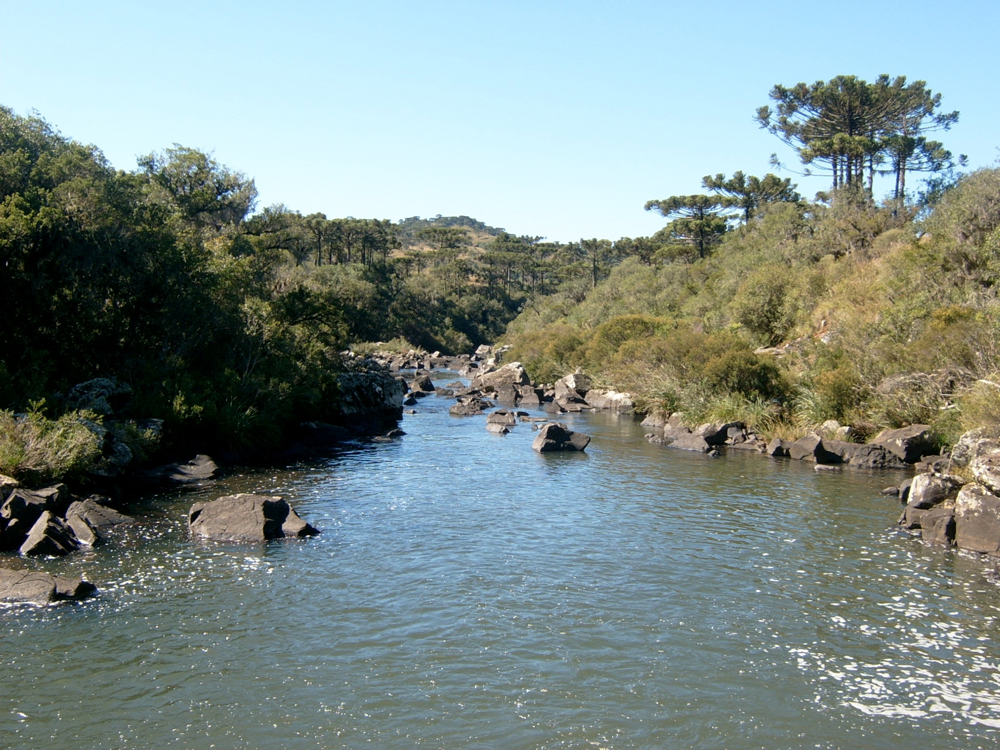 Fotografia tirada no Rio das Pedras no município de Painel SC, com paisagem típico do planalto serrano, mata nativa e araucárias.